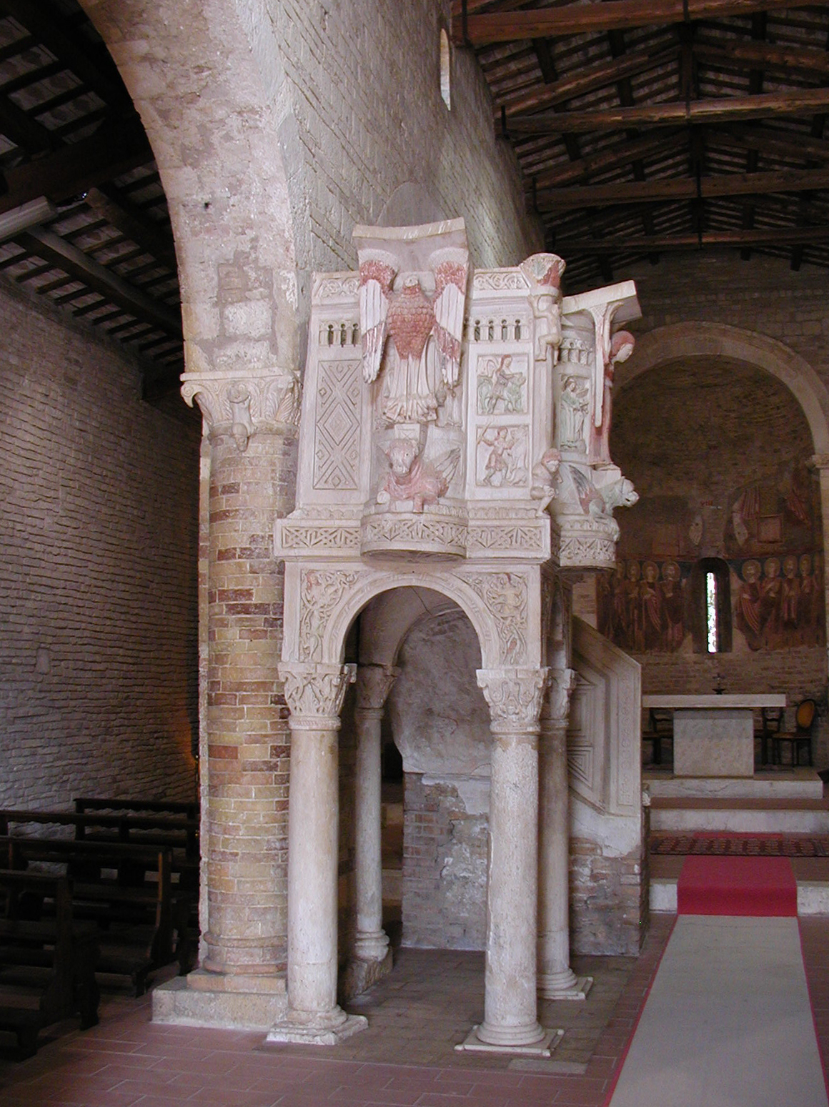 Image: Noch ein Bick zurück auf die Kanzel